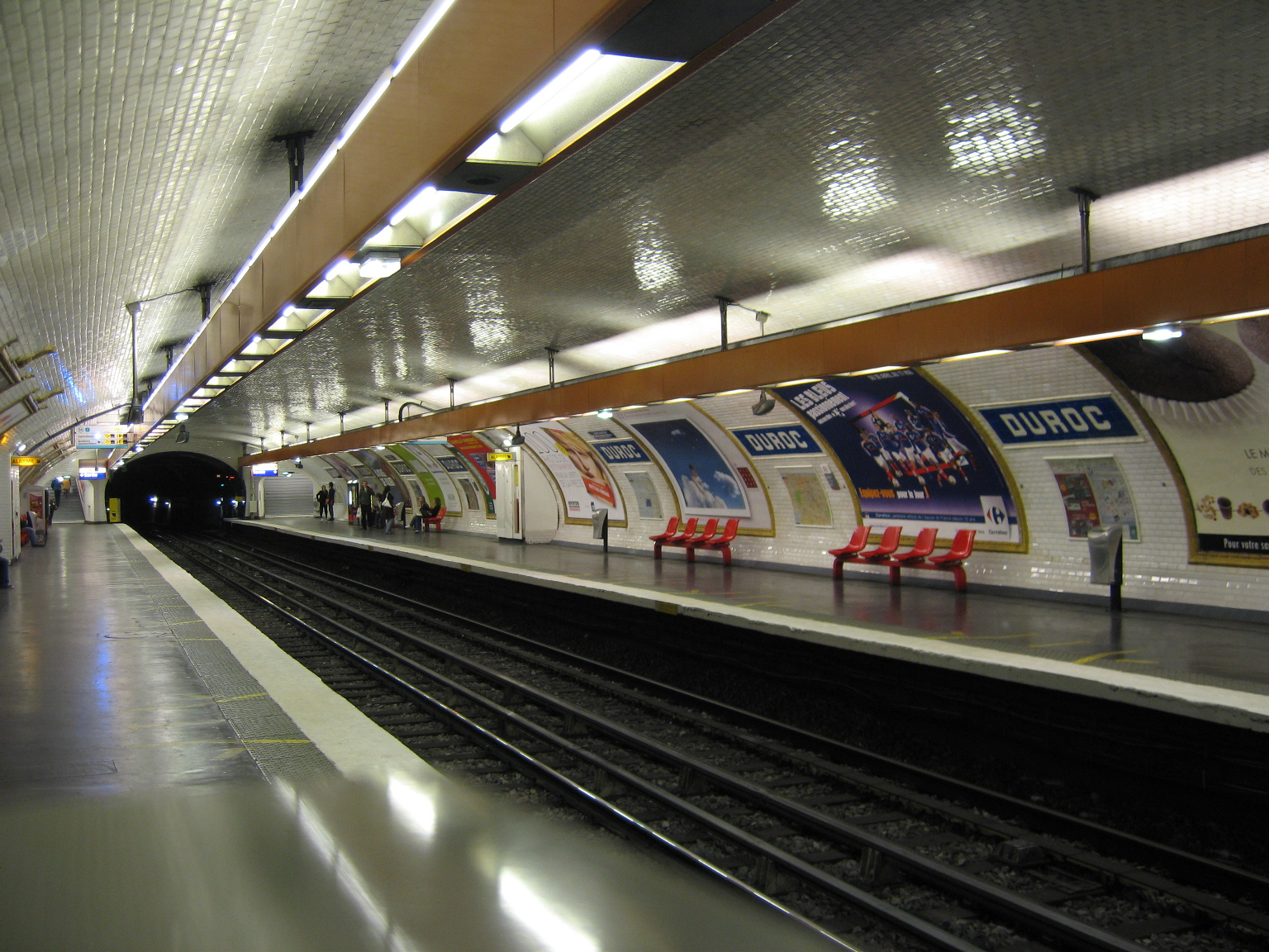 Station Duroc, ligne 13 du métro de Paris.